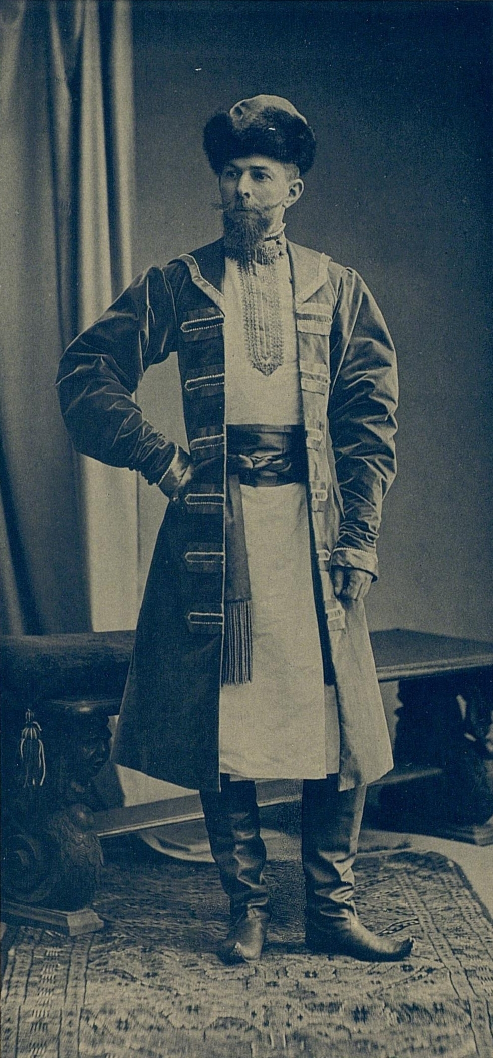 Адъютант Его Императорского Высочества Великого Князя Владимира Александровича Илья Леонидович Татищев (Боярин XVII века)